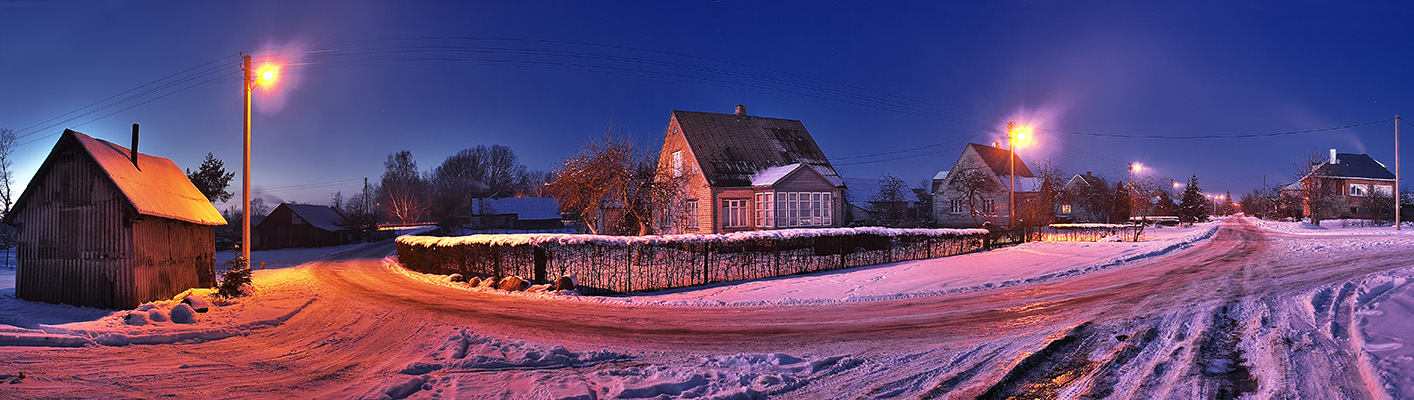 Karčemos – kaimas Radviliškio rajone